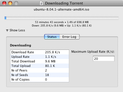 Arquivo sendo transferindo no Formato Torrent 1.5.1, que é um cliente de BitTorrent.